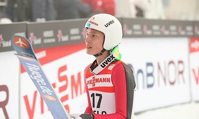 Jewgienij Lewkin podczas serii kwalifikacyjnej przed konkursem indywidualnym mężczyzn na skoczni normalnej na Mistrzostwach Świata w Narciarstwie Klasycznym 2011 w Oslo.